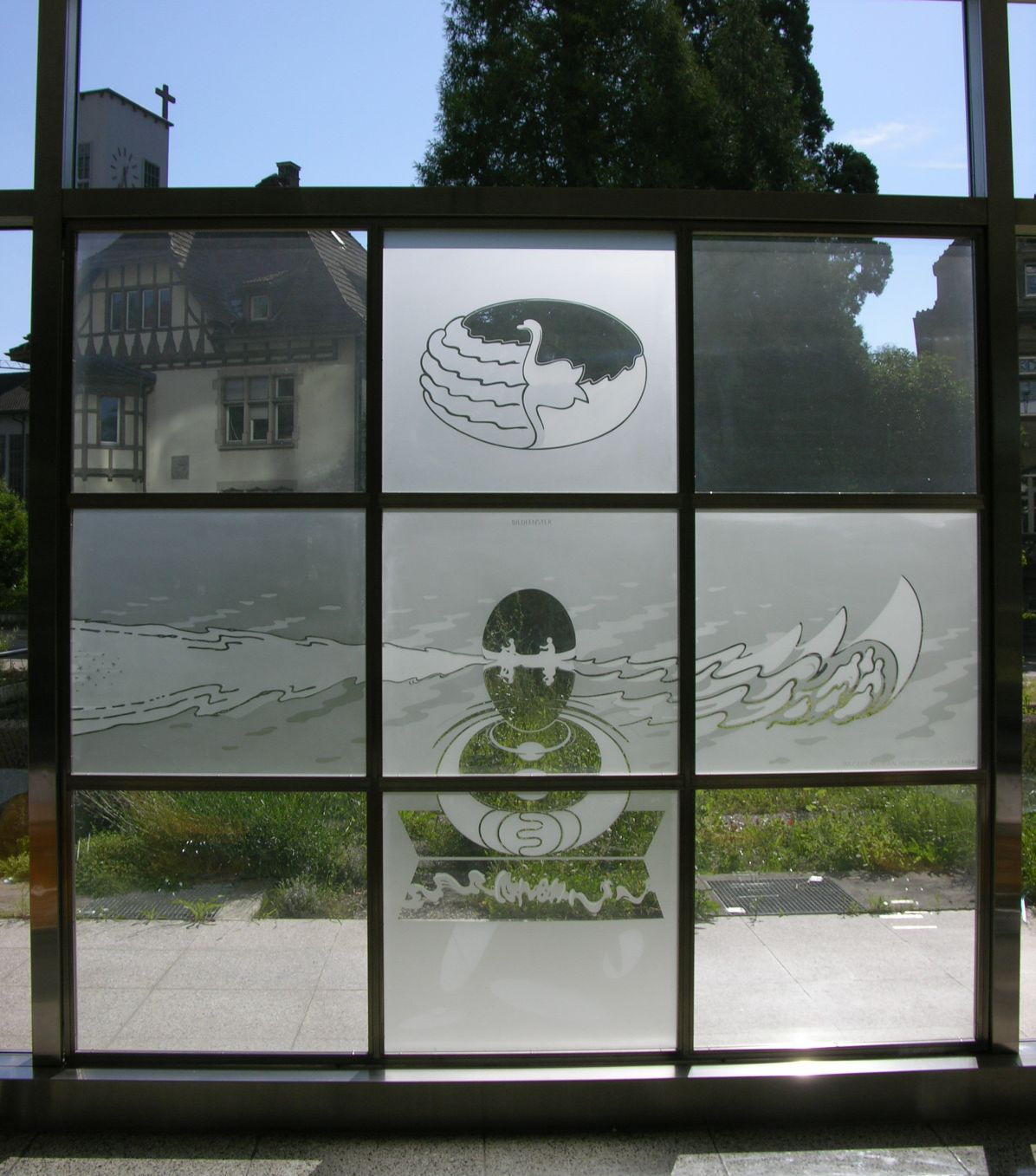 Window-picture of Hugo Suter at Alte Kantonsschukle Aarau (Aarau, Switzerland)